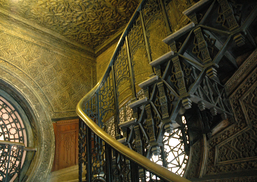 Escada do pavilhão da Fiocruz, no Rio de Janeiro, Brasil. Foto de Roberta Smania, tirada em 12 de setembro de 2006